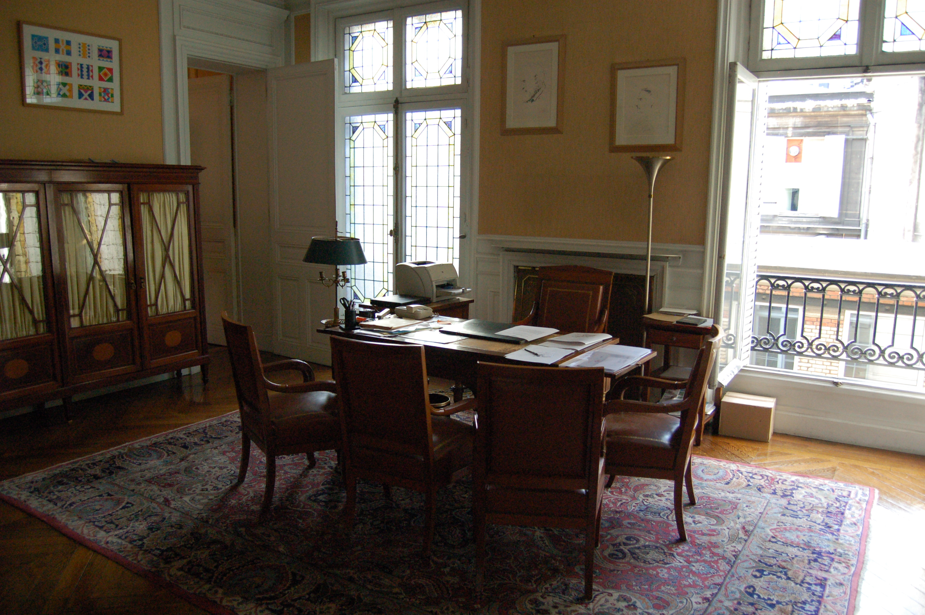 Cabinet du Secrétaire Perpétuel de l'Académie nationale de Médecine, Paris, France